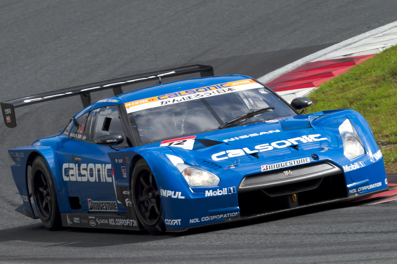 Super GT 2011 Rd.6 Fuji GT 250km: Tsugio Matsuda (Team Impul) driving the Nissan GT-R GT500.